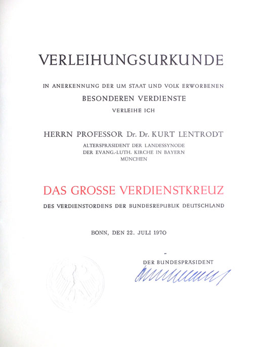 Verleihungsurkunde des Großen Verdienstkreuzes des Verdienstordens der Bundesrepublik Deutschland für Kurt Lentrodt